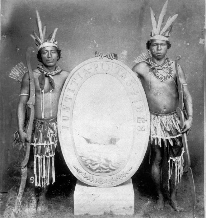 Foto. Twee Carib-indianen tonen het wapenschild van Suriname en vormen daarbij het wapen van Suriname.